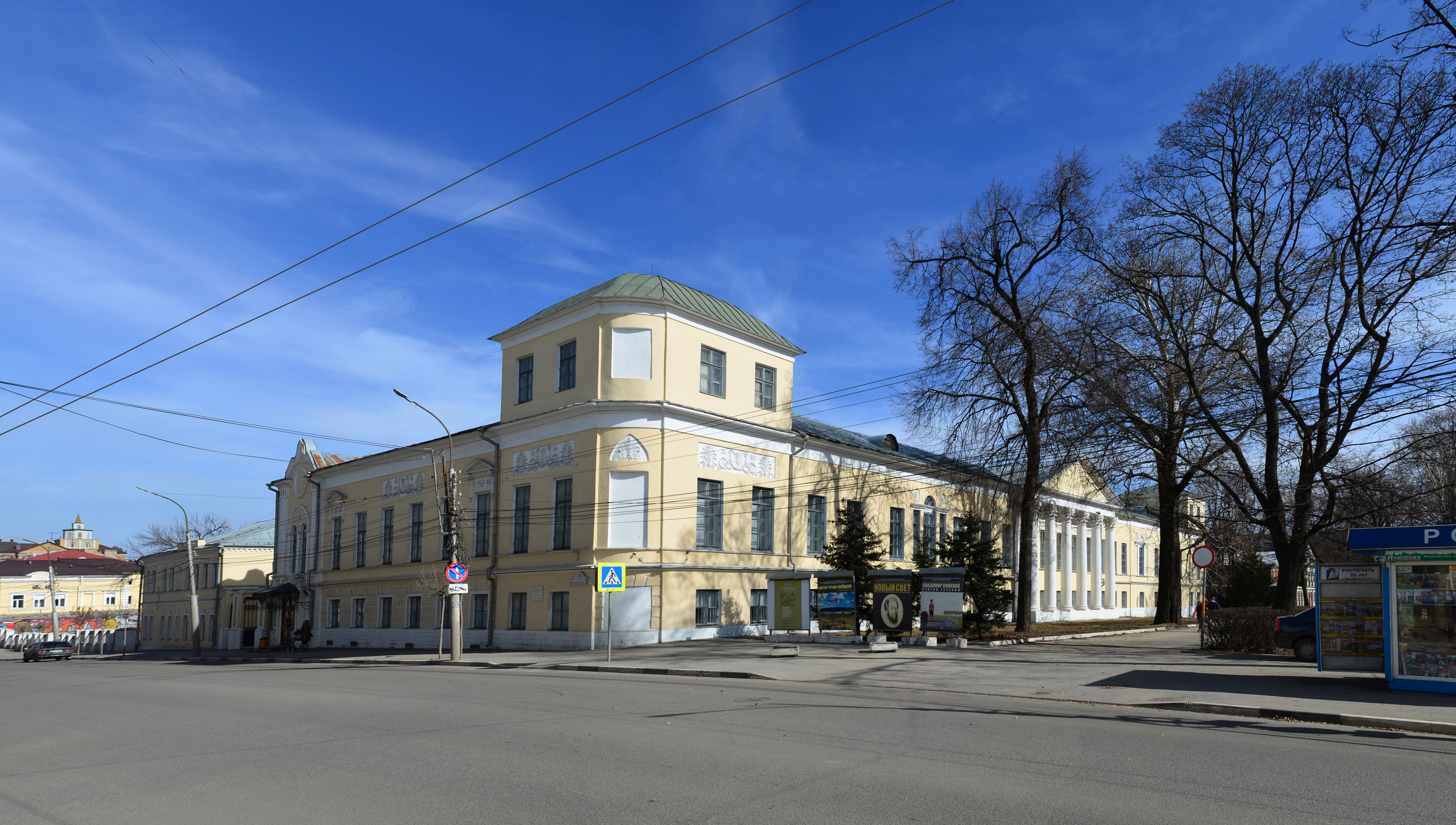 Рязанский государственный областной художественный музей им.И.П.Пожалостина.Бывший дом рязанского мецената Г.В.Рюмина.